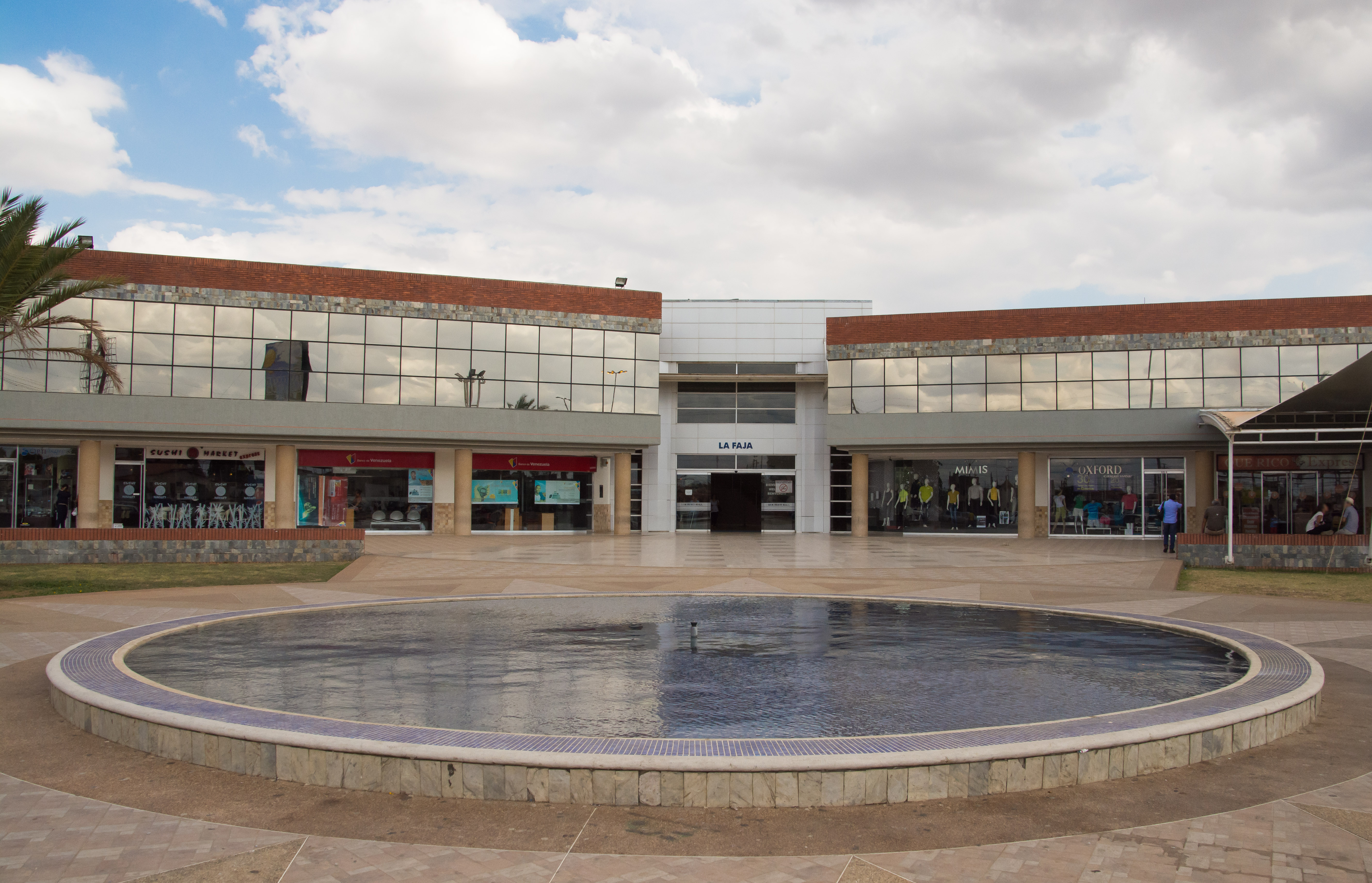 Entrada La Faja del Centro Comercial San Remo Mall El Tigre Anzoátegui